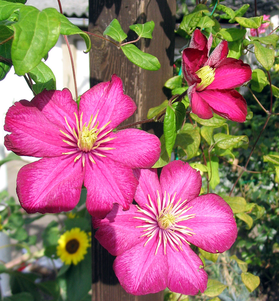 Beschreibung: Clematis 'Ville de Lyon' Fotograf: Darkone, 18. September 2004